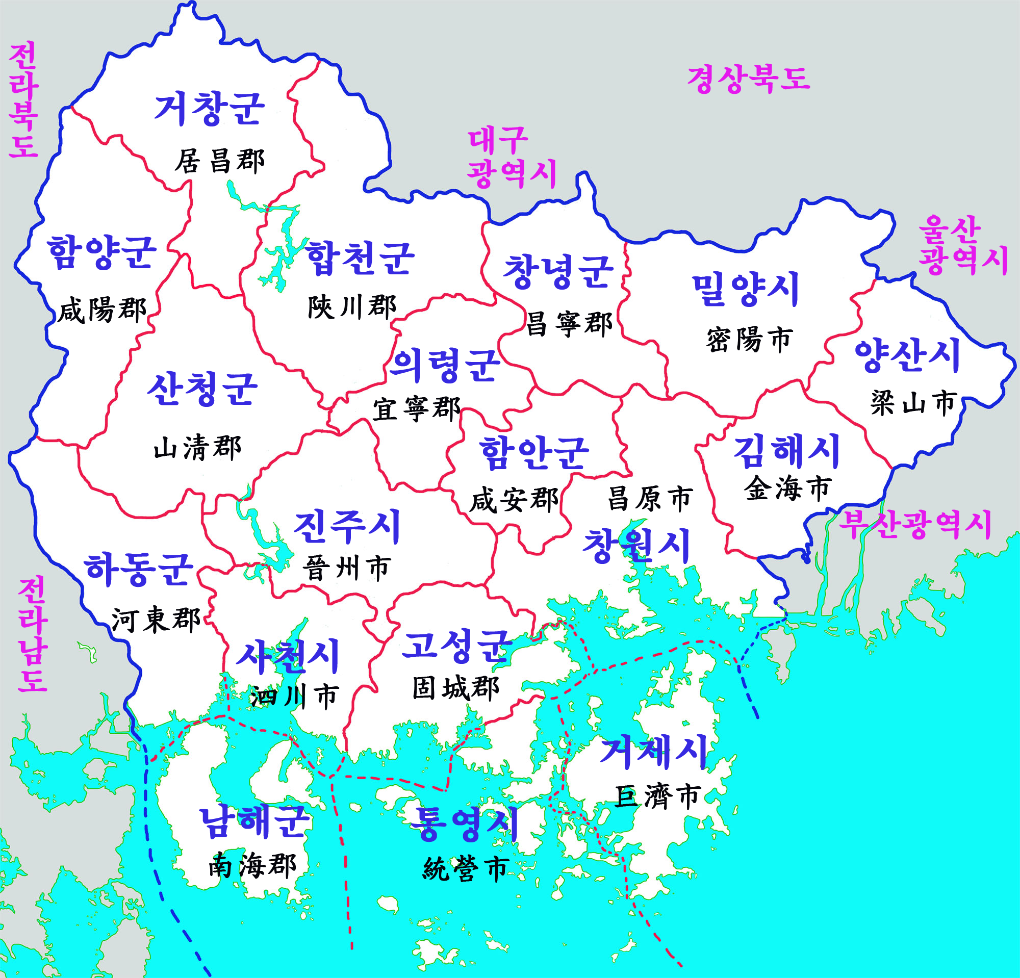 경상남도 행정구역도